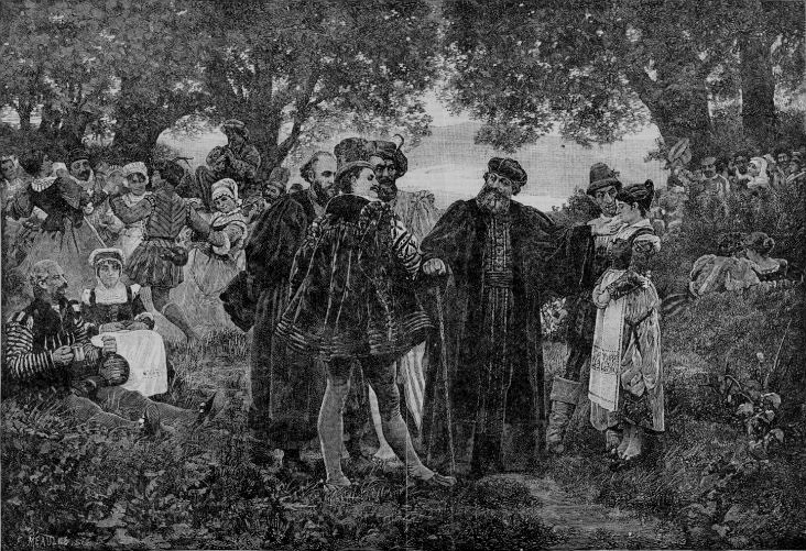 Gravure pour le tableau de Jules Garnier (1847-1889) présenté au salon de 1880